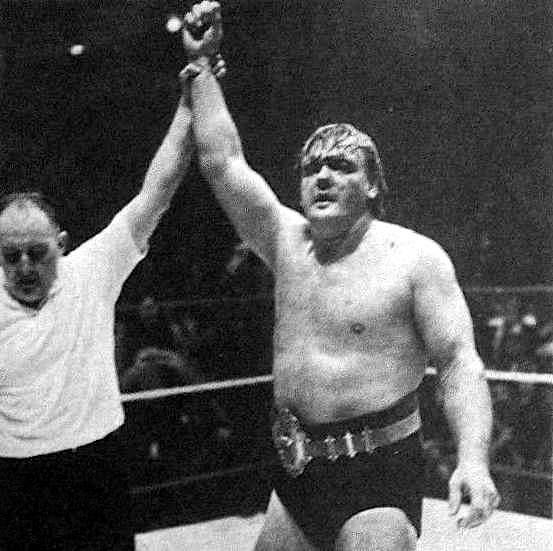 Johnny Valentine en tant que champion poids lourds dans le magazine de catch Wrestling Annual de juin 1975